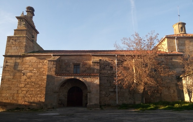 Fachada sur de la iglesia de Santiago Apóstol en La Alameda de Gardón, construcción de finales del siglo XVI, reconstruida en gran parte en el siglo XVIII.